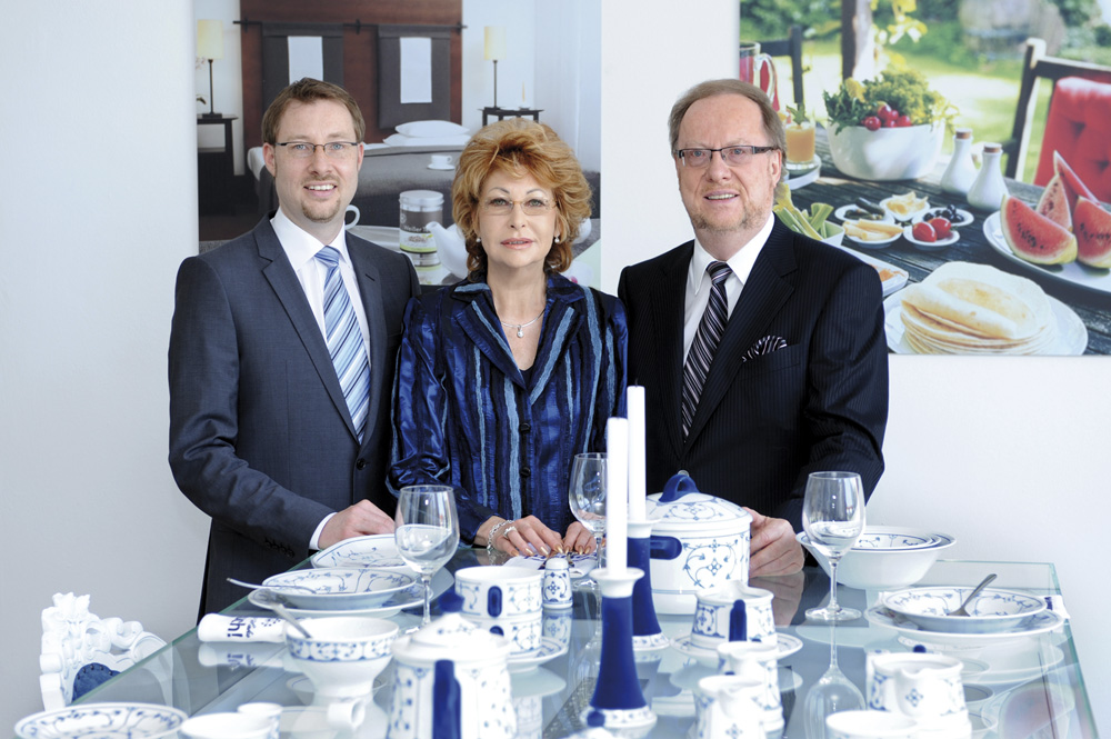 Inhaberfamilie Raithel